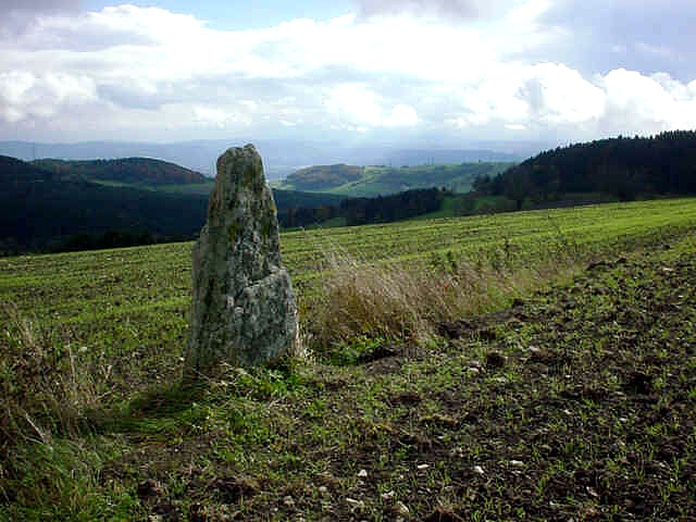 Menhir- Nöggenschwiel - Baden-Württemberg - Deutschland